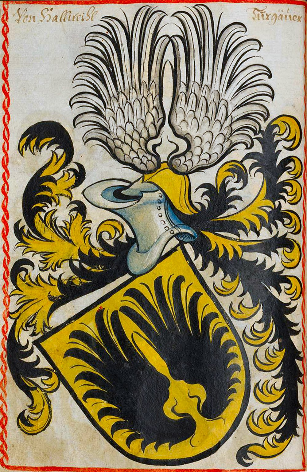 Scheibler'sches Wappenbuch , älterer Teil; Seite 104 Von Hallweihl Turgäuer